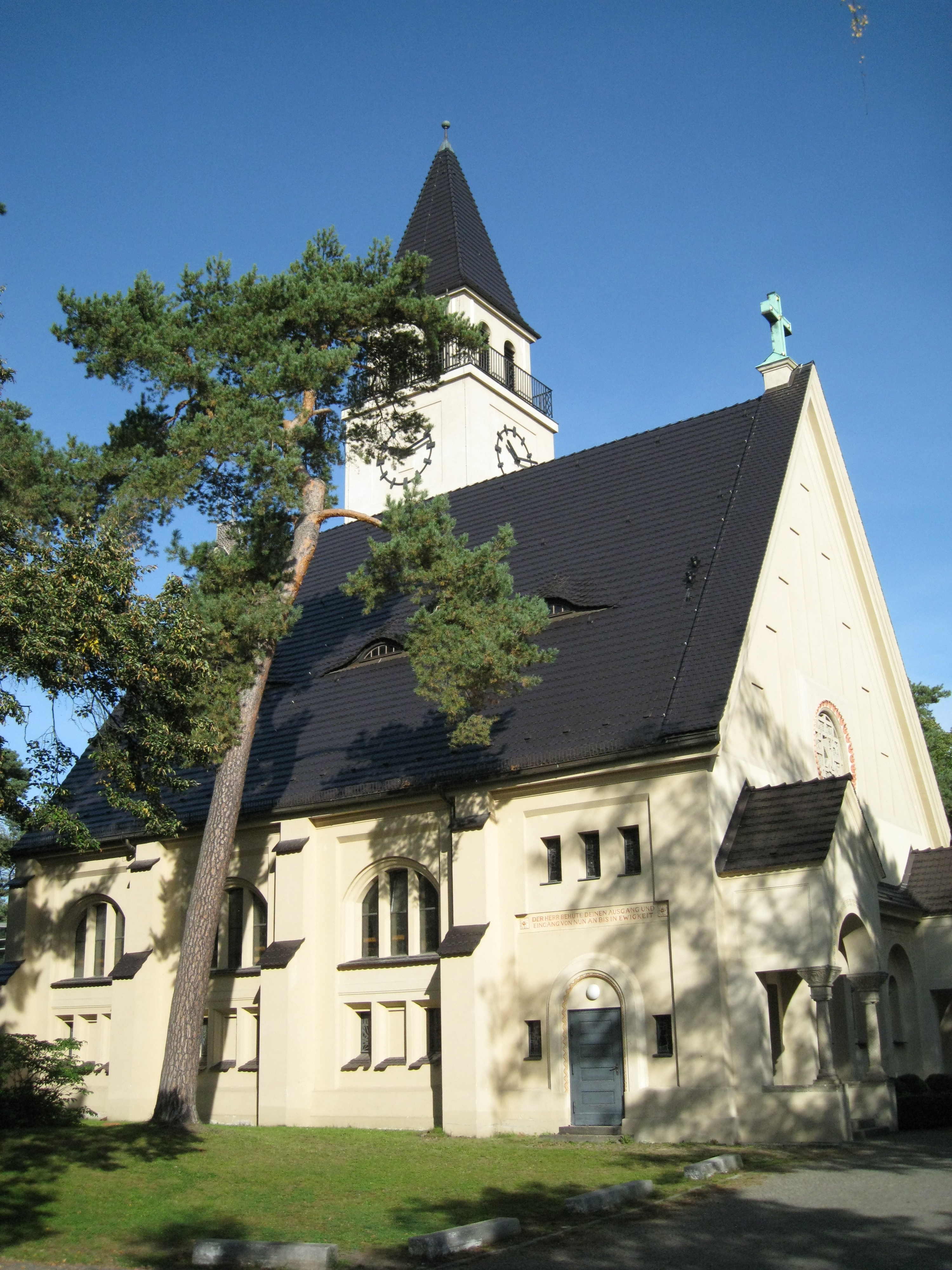 Blick auf das Kirchenschiff der Johanneskirche Schlachtensee